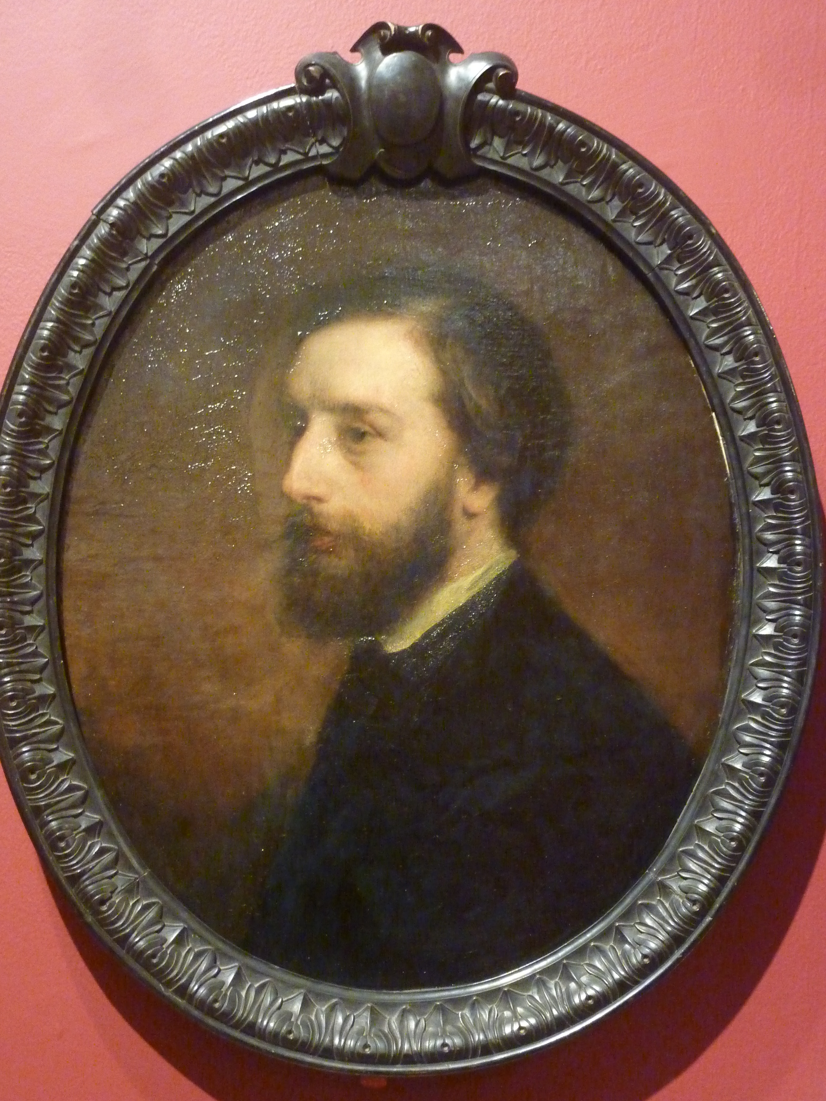 L'homme blessétitle QS:P1476,fr:"L'homme blessé" label QS:Lfr,"L'homme blessé" or